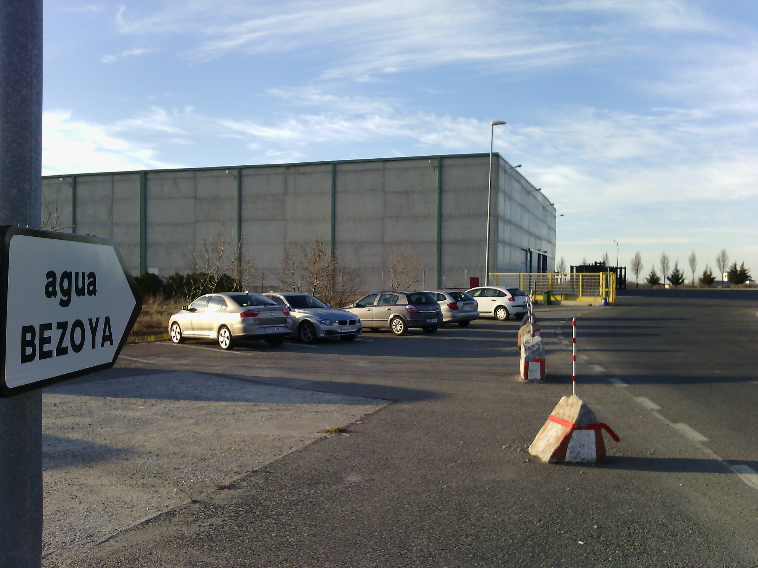 Planta de Bezoya en Trescasas (Segovia, España).